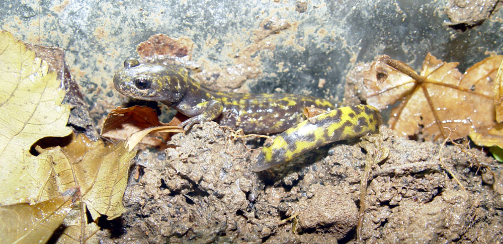 Paradactylodon persicus